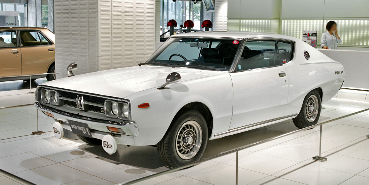 Nissan Skyline C110 Hardtop 2000 GTX-E ( KGC111 )